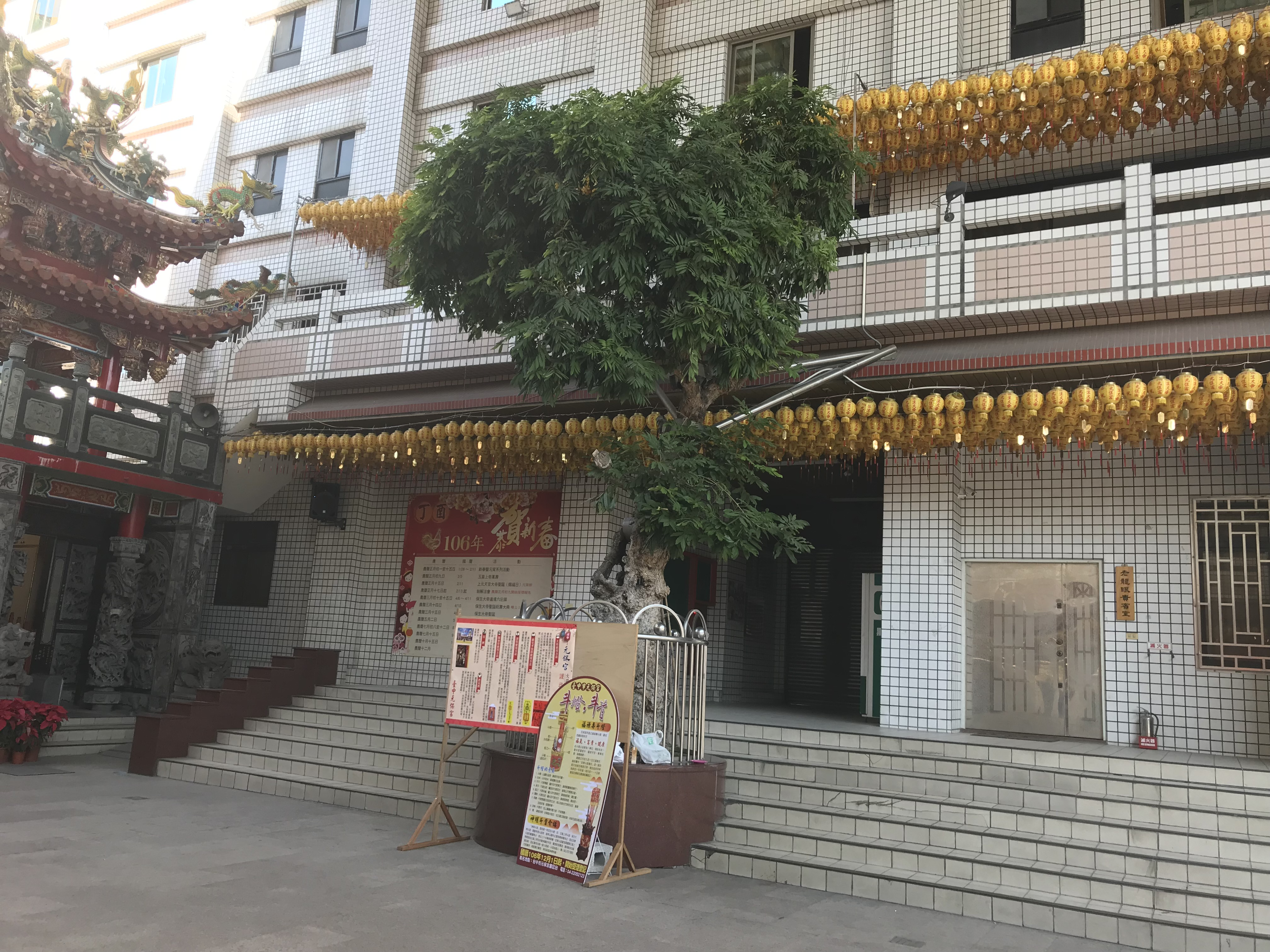 元保宮龍眼樹